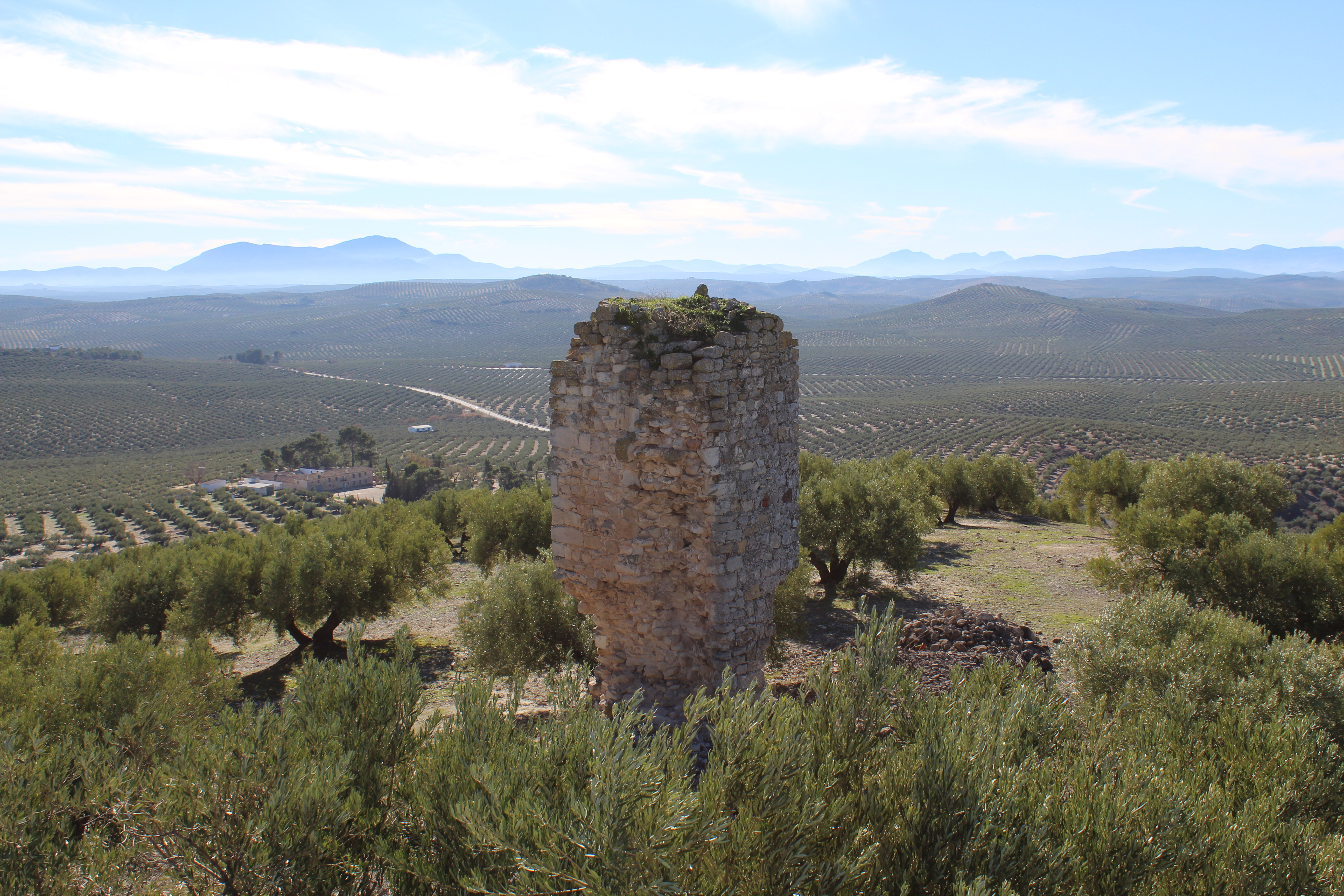 Vista de Torre Benzalá, de la campiña giennense y de la Sierra Sur de Jaén.